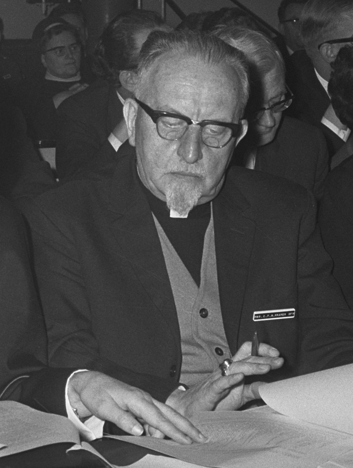 Collectie / Archief : Fotocollectie Anefo Reportage / Serie : [ onbekend ] Beschrijving : Pastoraal Concilie in Noordwijkerhout bijeen drie daagse vergadering mgr. Angelo Felici , mgr. Kramer Datum : 6 januari 1969 Locatie : Noordwijkerhout, Zuid-Holland Trefwoorden : CONCILIE Fotograaf : Koch, Eric / Anefo Auteursrechthebbende : Nationaal Archief Materiaalsoort : Negatief (zwart/wit) Nummer archiefinventaris : bekijk toegang 2.24.01.05 Bestanddeelnummer : 921-9952